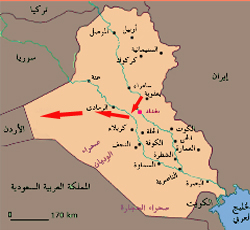 سير القطعات Licensing الصورة من تصميم د. جلال النعيمي ويضعها تحت تصرف الموسوعة.